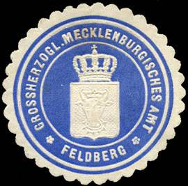 Sealing stamp Title: Gr. Mecklenburgisches Amt - Feldberg Description: blau, weiß, geprägt Place: Feldberg/Mecklenburg size: 4 cm